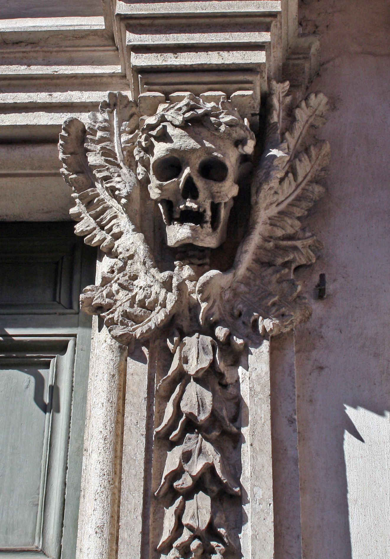 Facciata della chiesa di Santa Maria dell'Orazione e Morte